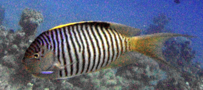 Genicanthus caudovitatus en Dhahab, Janub Sina', Egipto